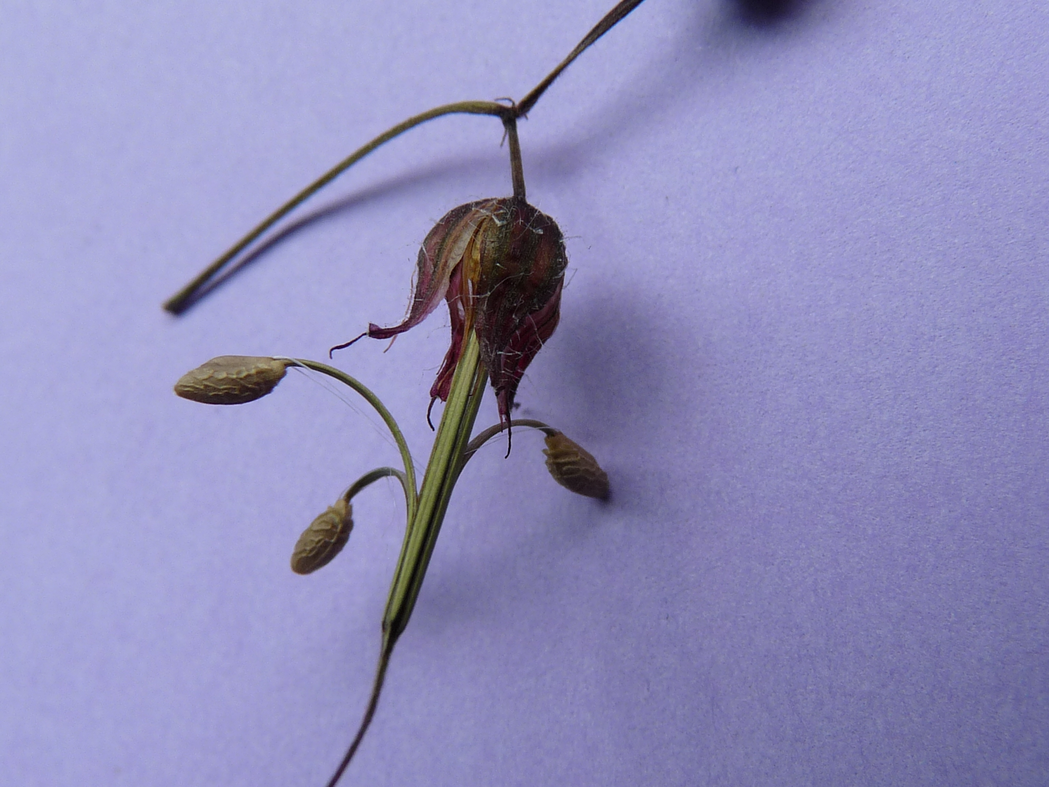 graines en cours de déhiscence